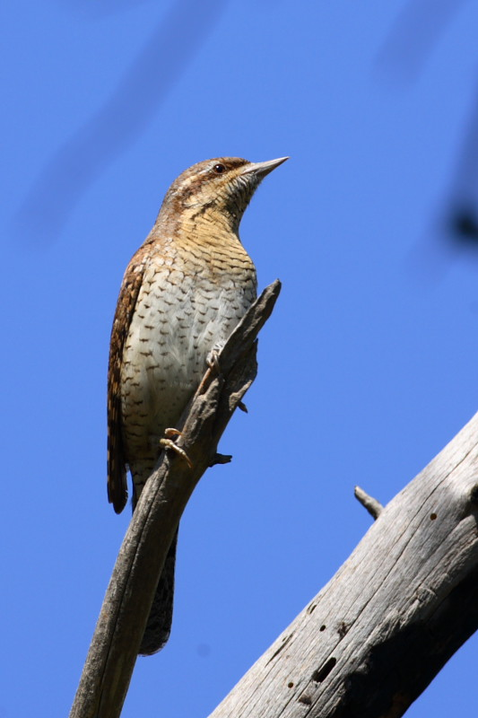 torcecuello en una rama